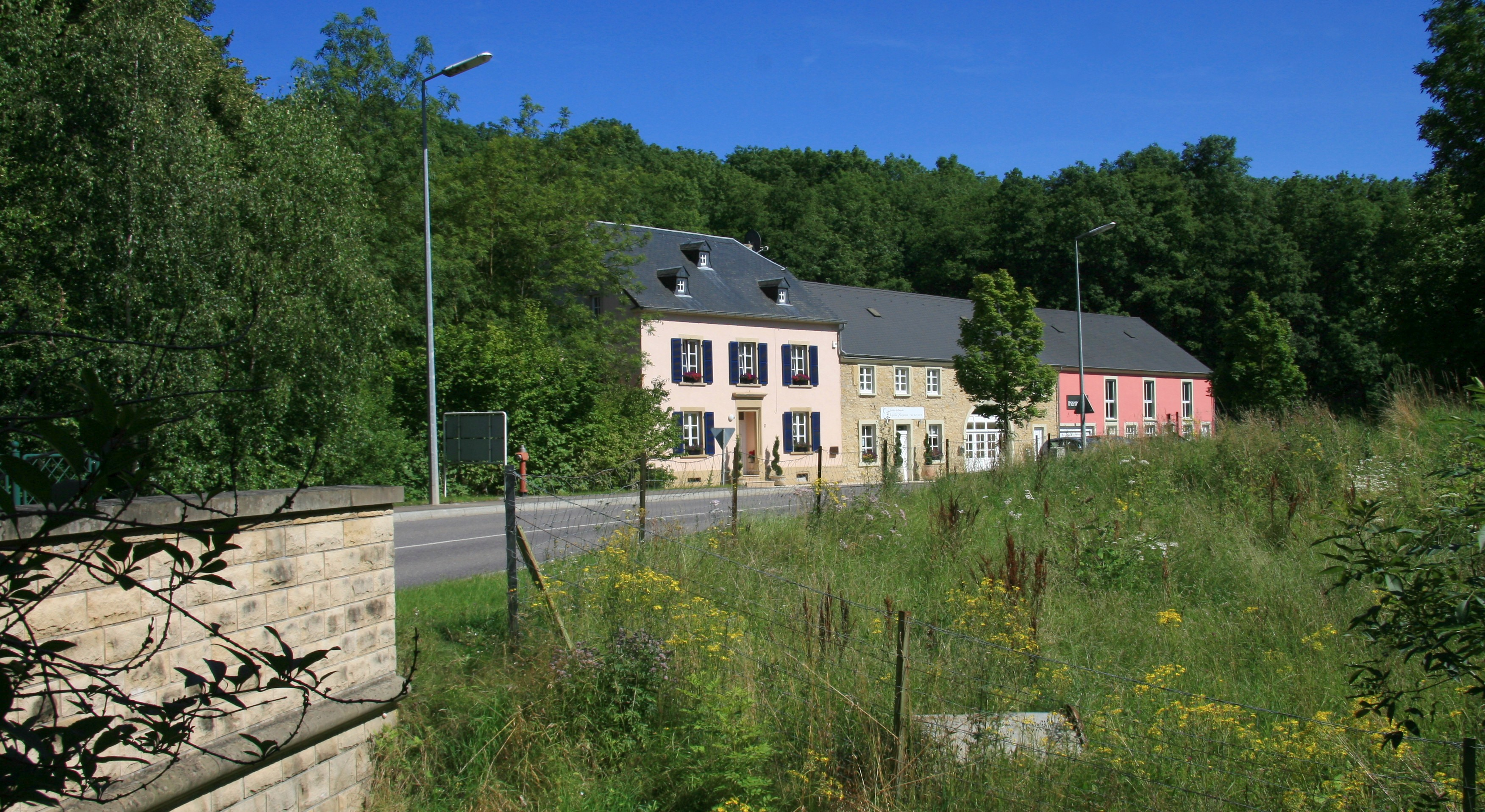 Vue op Buddelerbaach - user Ioni